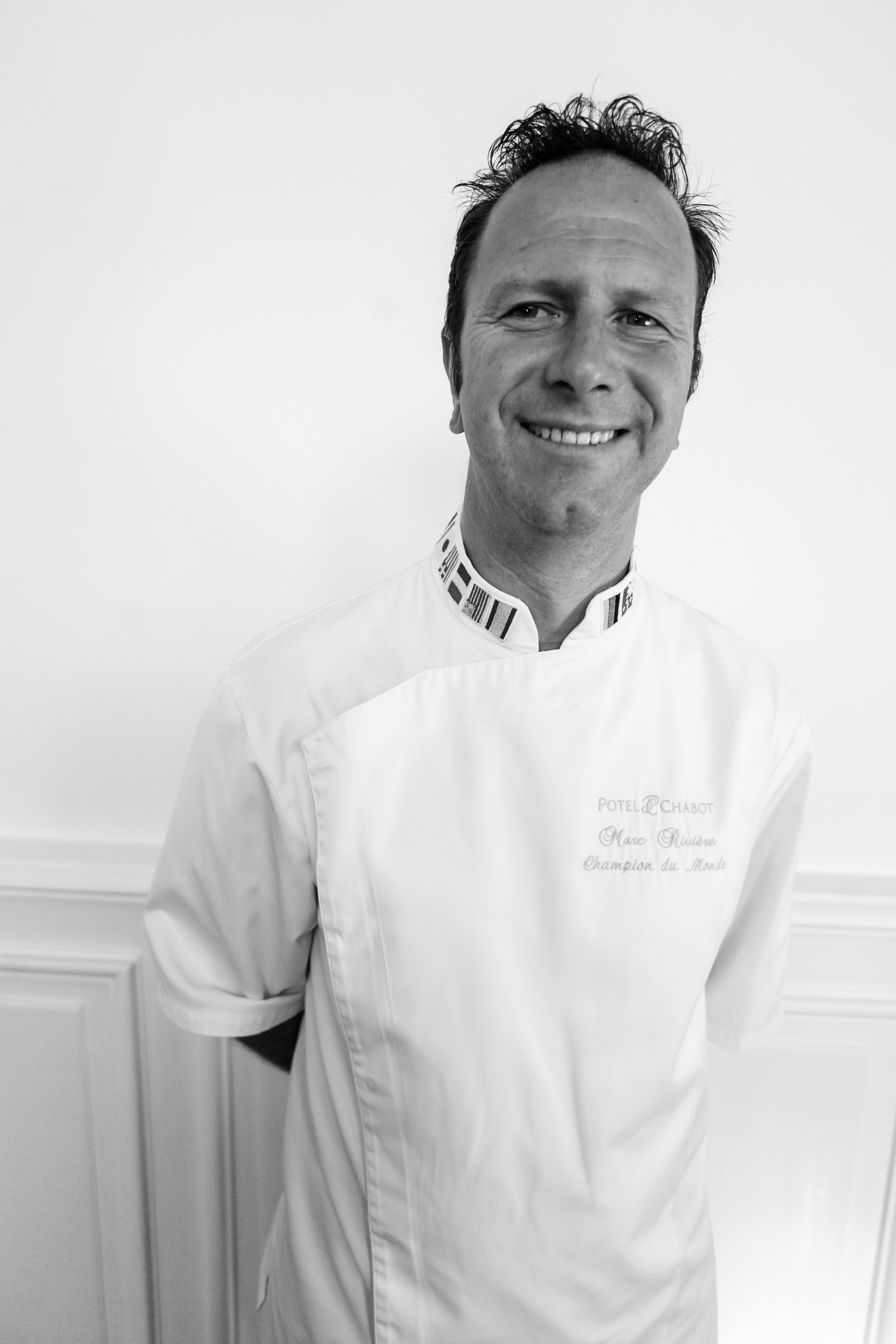 Portrait de Marc Rivière 2013